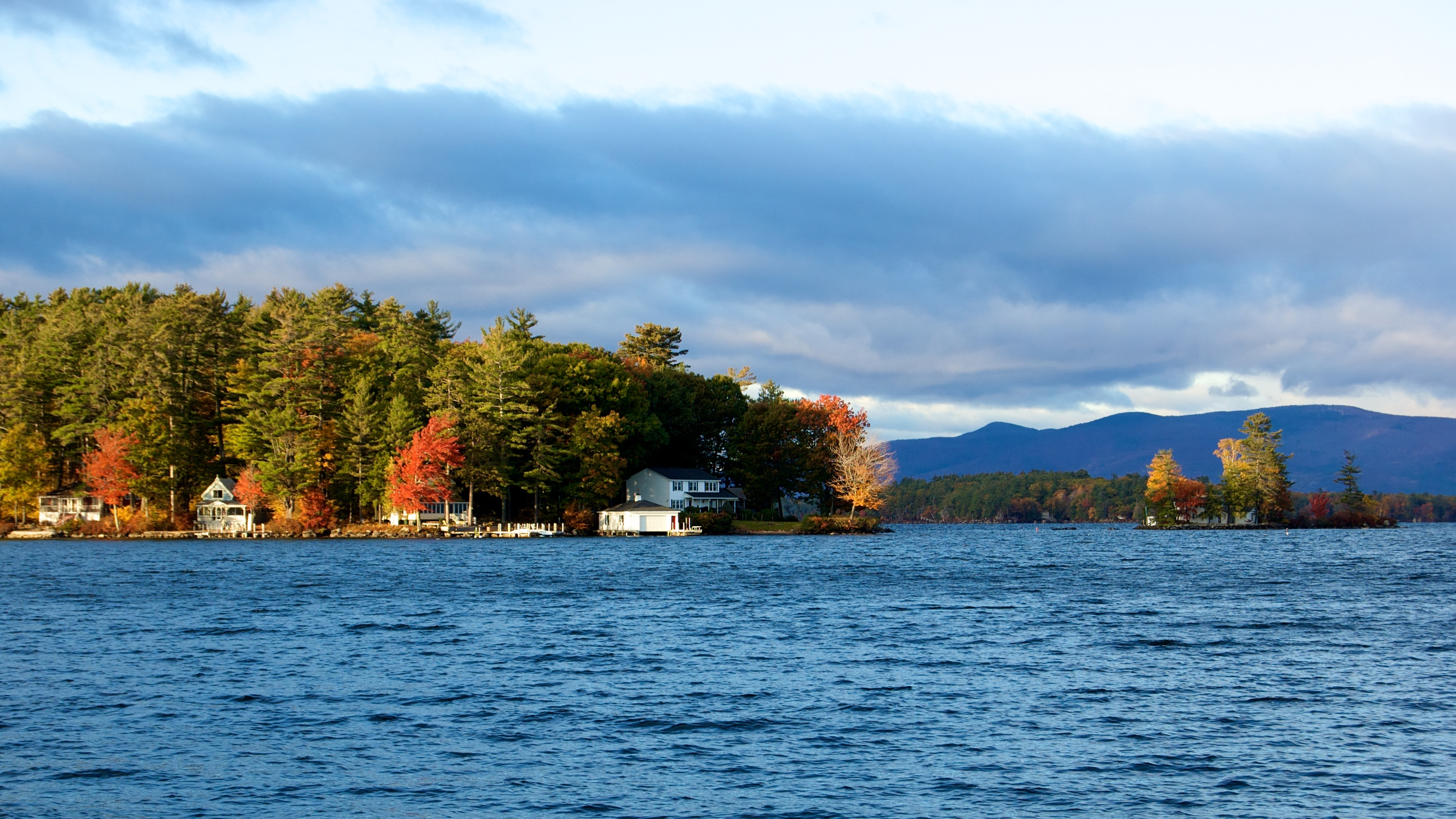 Lake Winnipesaukee